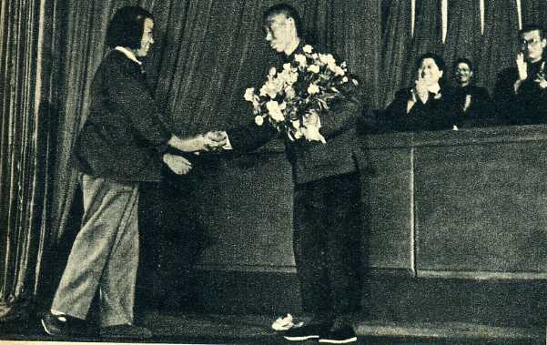 北京市农业劳动模范殷维臣代表中国农民在中国工会第七次全国代表大会上发言